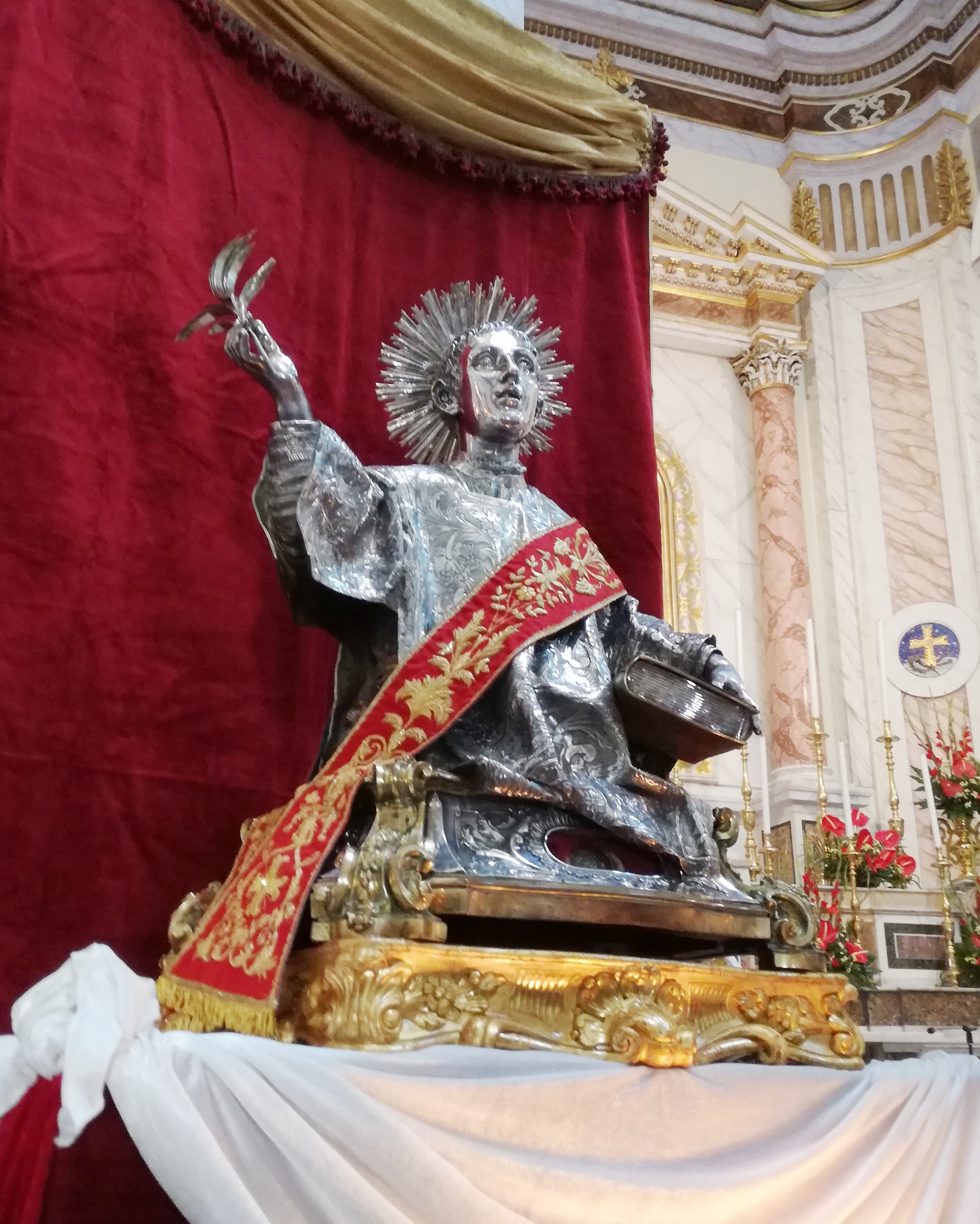 Busto reliquiario argenteo di San Cesario diacono e martire che si conserva nella Parrocchia di San Cesario in Cesa (Caserta)